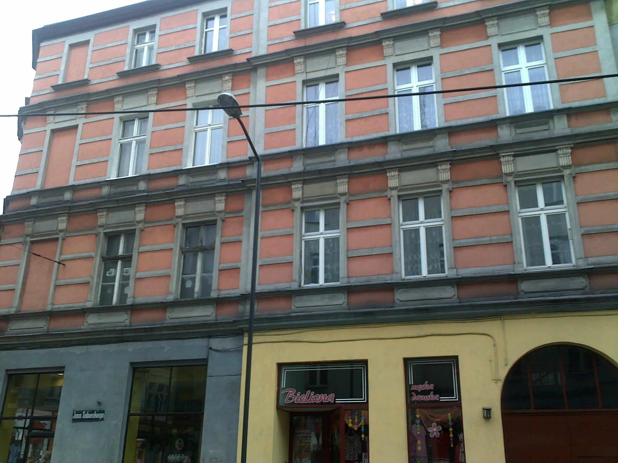 Kamienica rodziny Kempków w Chorzowie przy ulicy Sobieskiego